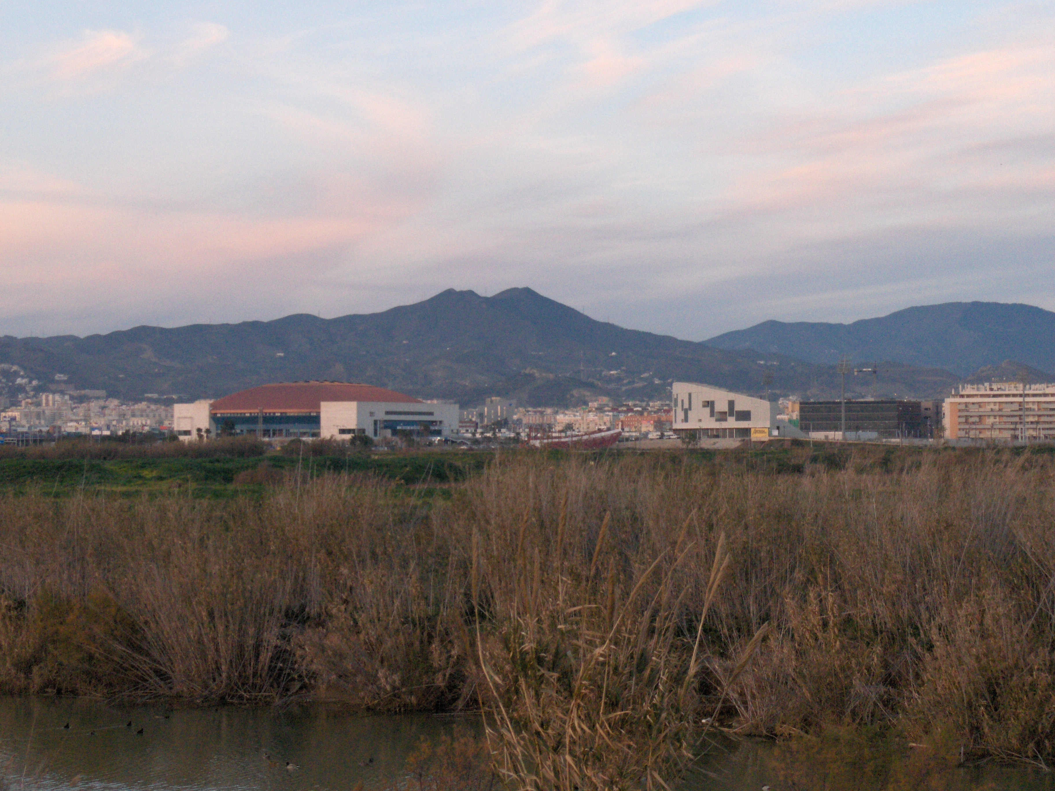 Palacio de Deportes Martín Carpena (izquierda) y Estadio de Atletismo Ciudad de Málaga (derecha), vistos desde el Paraje Natural de la Desembocadura del Guadalhorce.